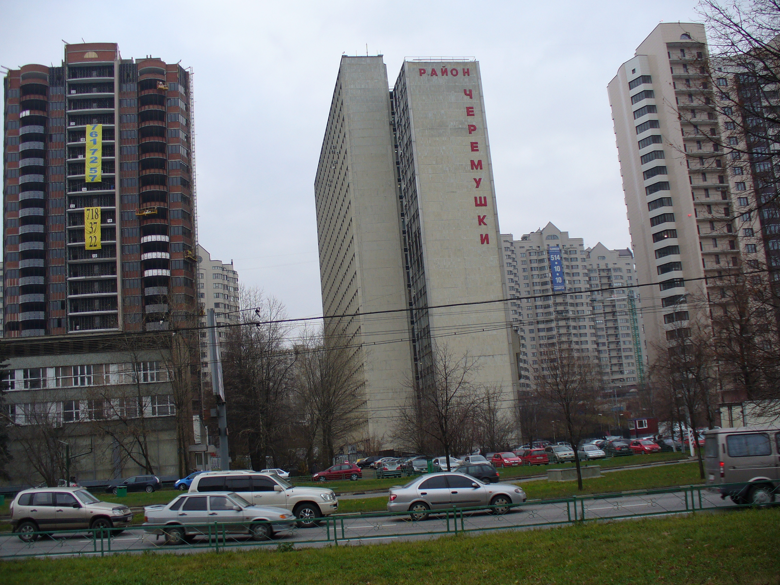 Дома на Нахимовском проспекте в районе Черёмушки